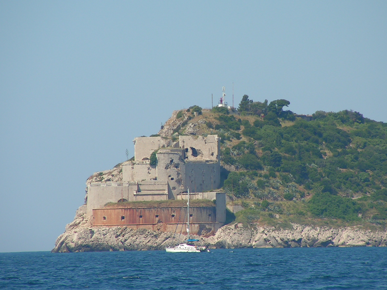 Prevlaka